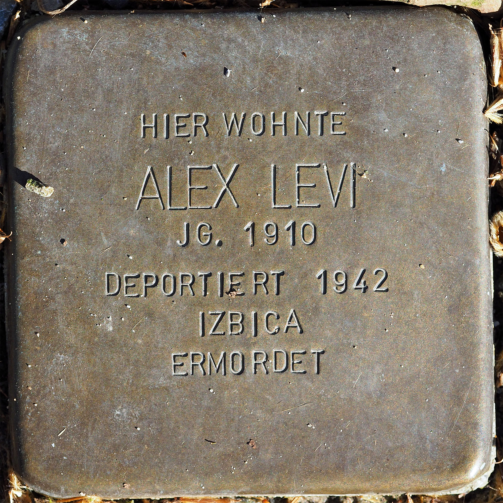 Stolpersteine MG: Levi, Alex